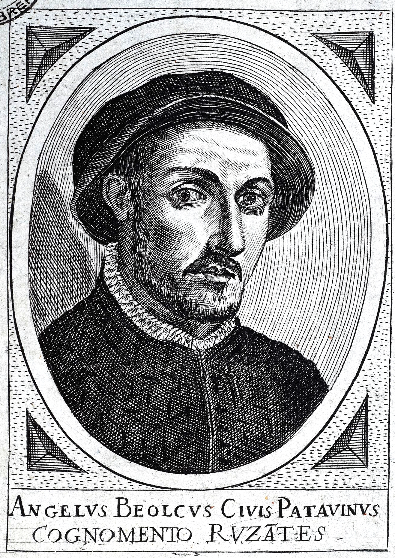 Portrait de "Angelus Beolcus civis Patavinus cognomento Ruza(n)tes", dans: Giacomo Filippo Tomasini, Illustrium virorum elogia iconibus exornata, Patavii [Padoue], apud Donatum Pasquardum & socium, 1630, à la p. 30.